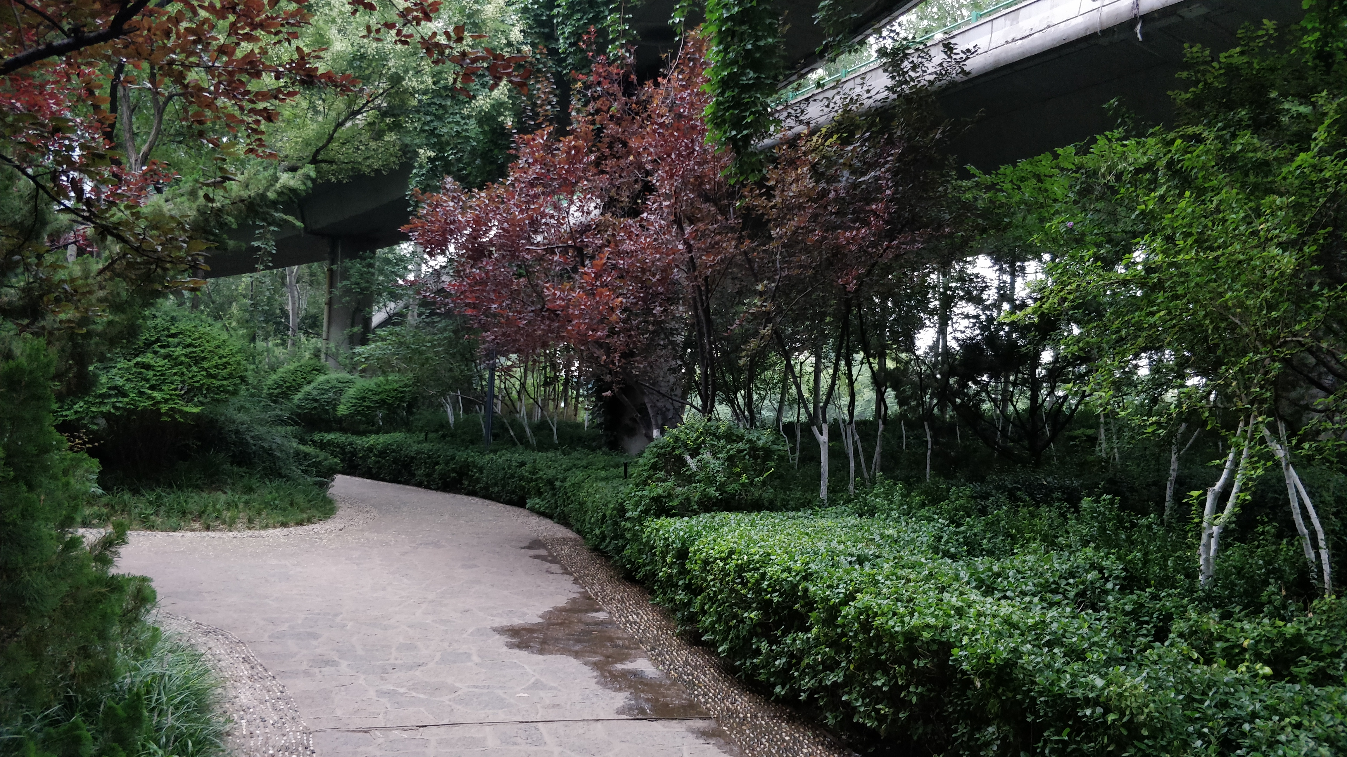 中文（中国大陆）: 济南燕山立交桥下的燕山公园